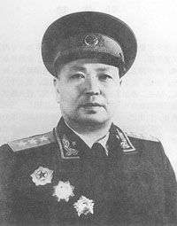 傅秋涛上将，中国人民解放军开国上将。